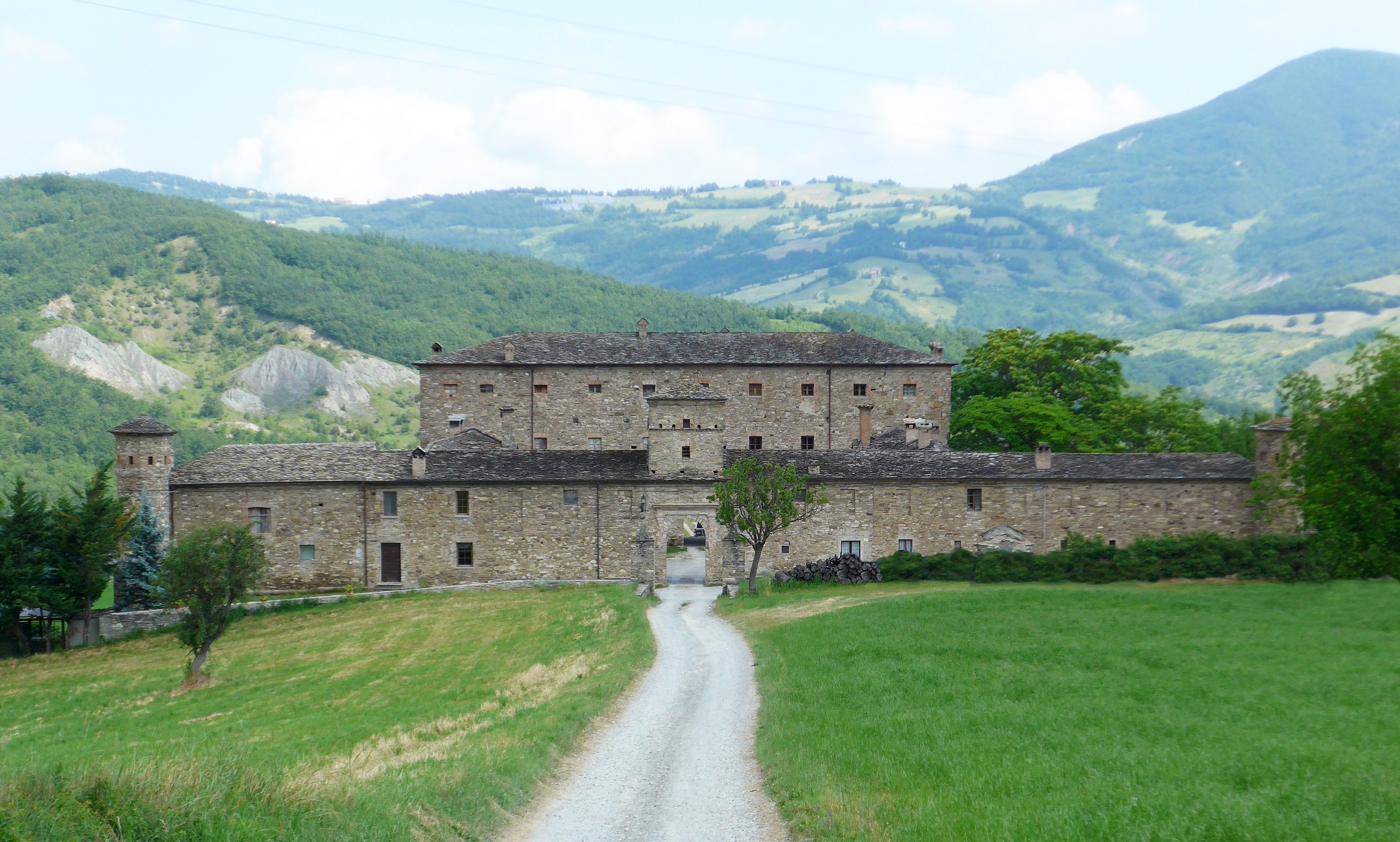 Varsi, frazione Golaso, il castello.